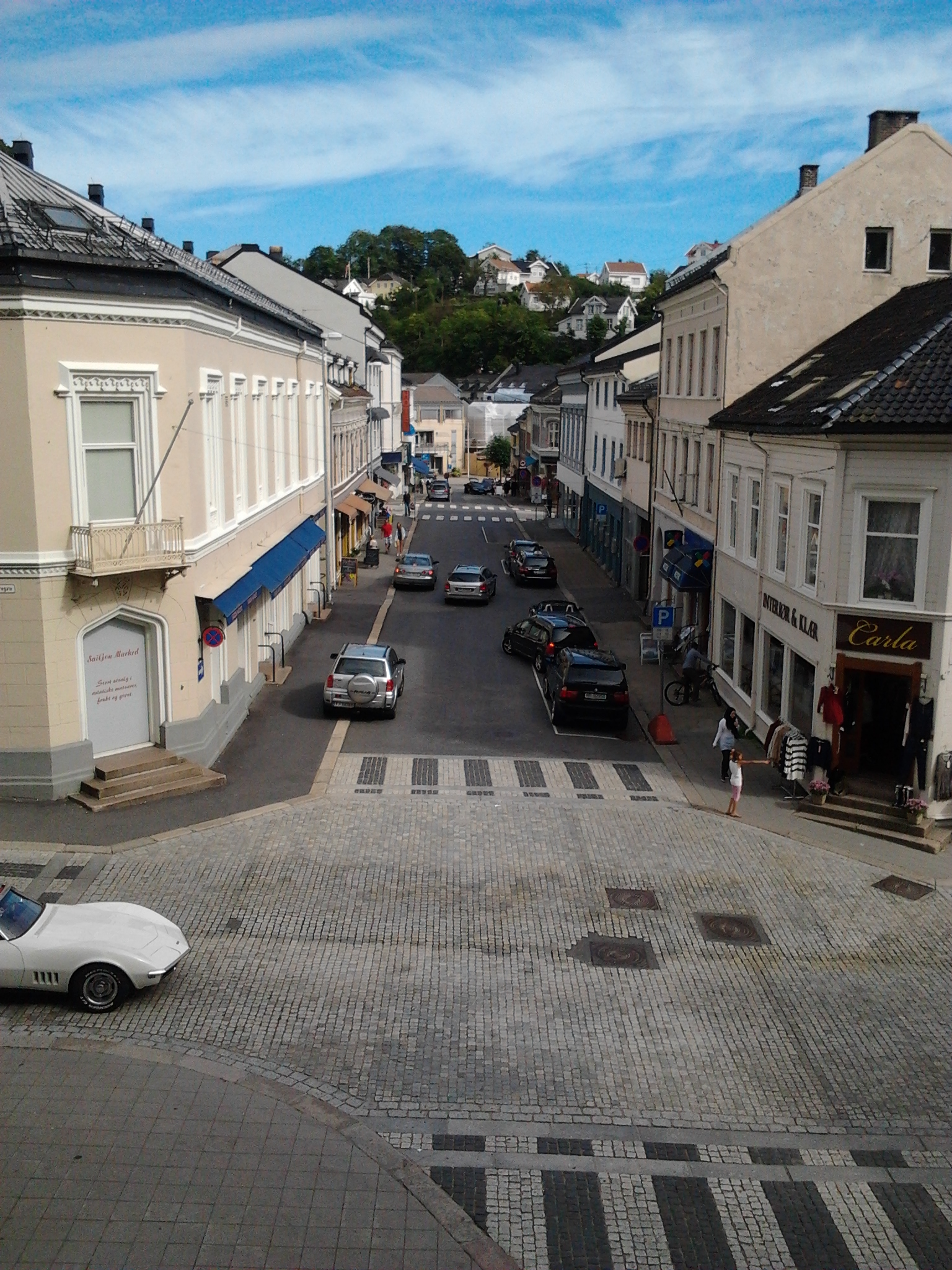 Torvgaten i Arendal